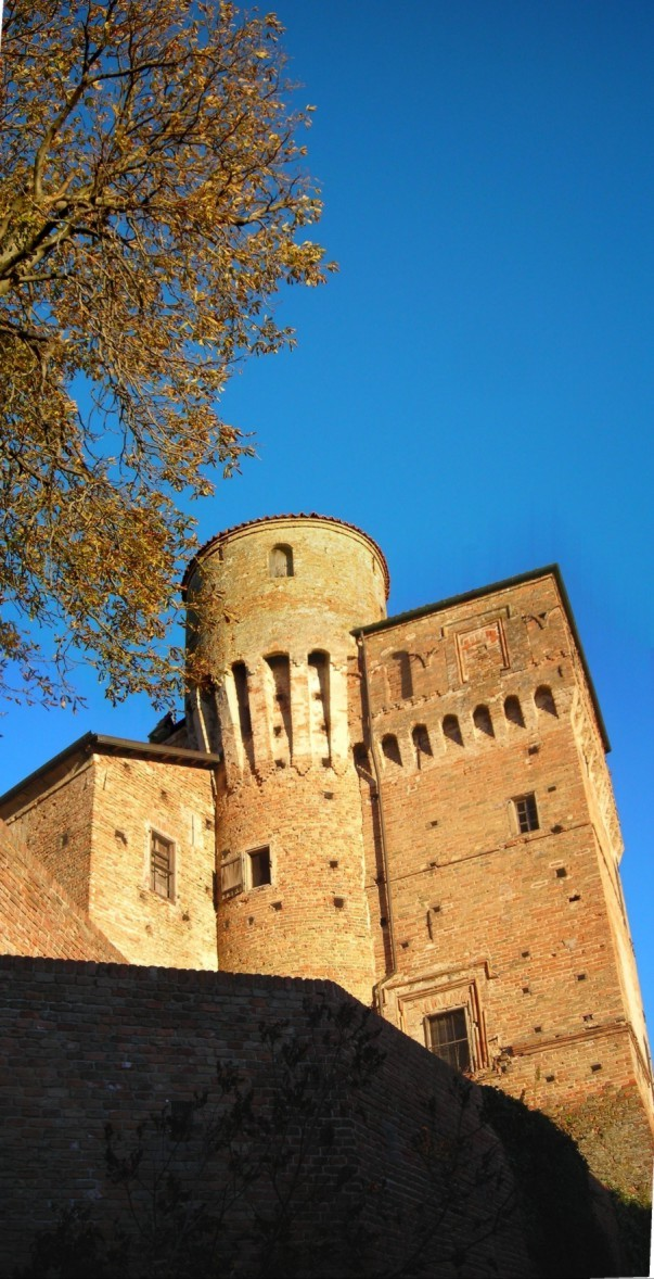 castello di Roddi (CN), Italia